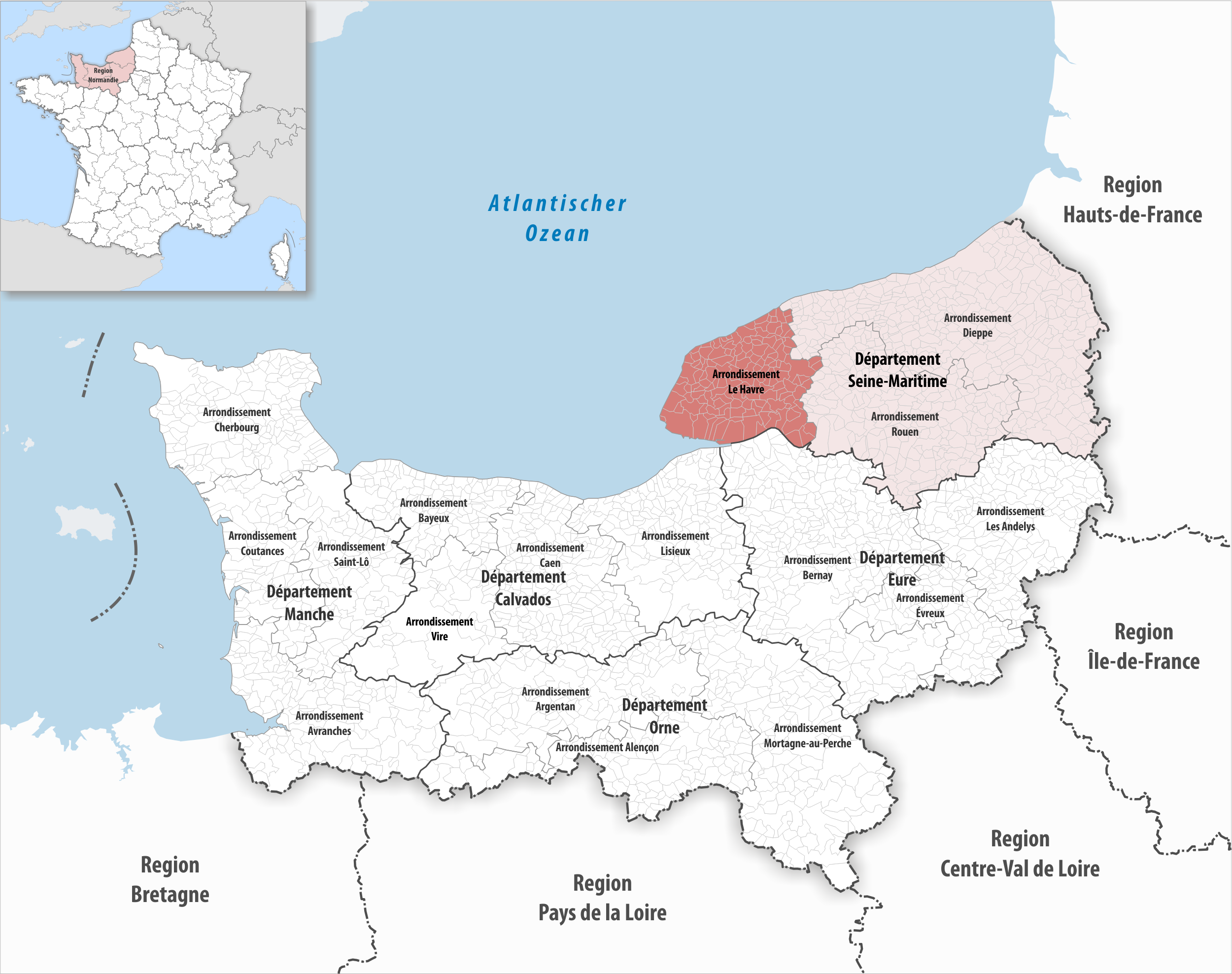 Lage des Arrondissements Le Havre